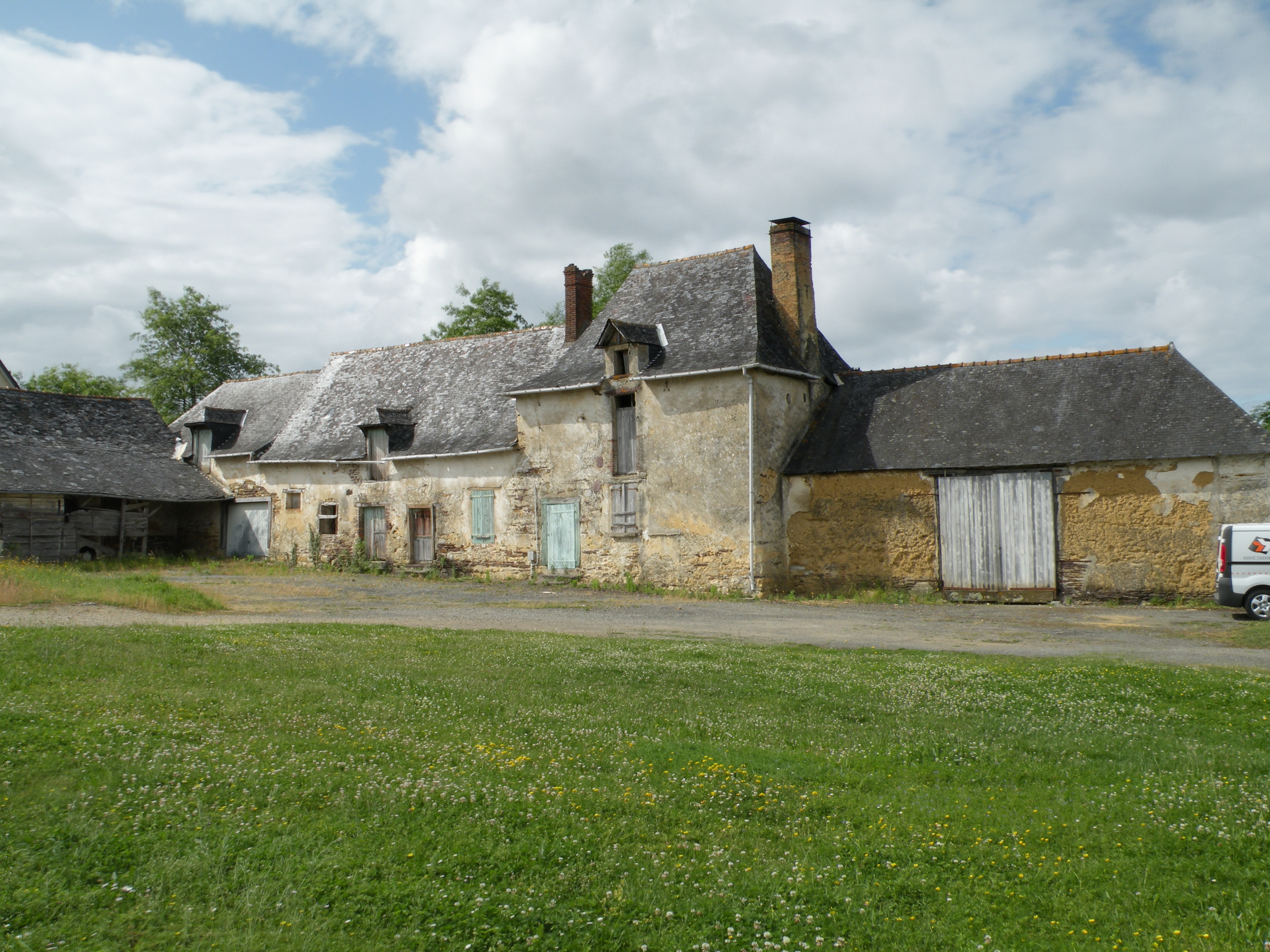 Ancienne ferme de la Grande Chardonnière à Chartres-de-Bretagne.